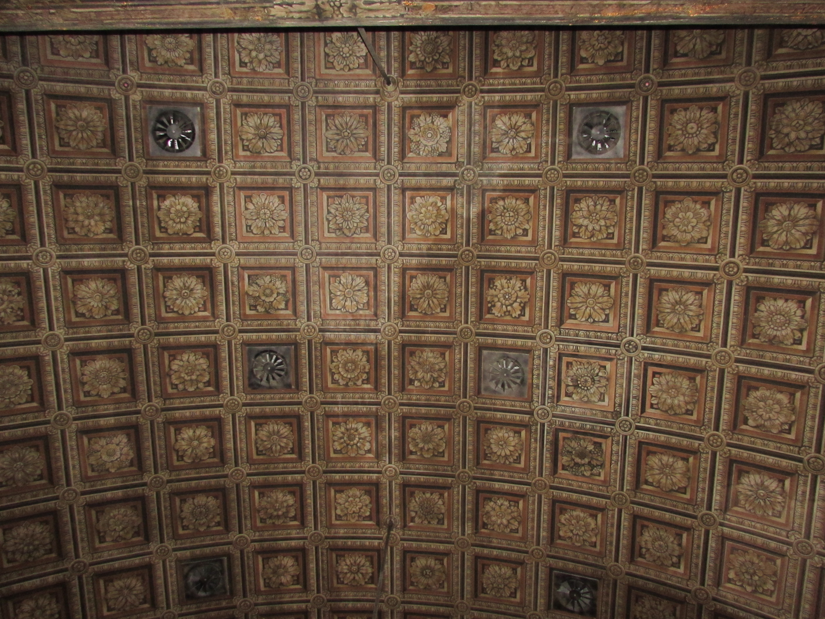 kasettendecke im ratssaal des altstädtischen rathauses in brandenburg